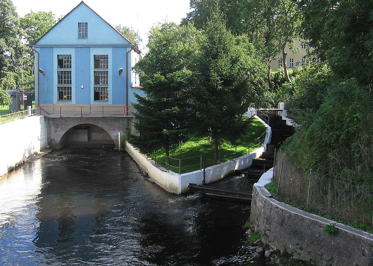 Mała Elektrownia Wodna "Trzebiatów I", zachodniopomorskie. Wybudowana w 1926 roku.